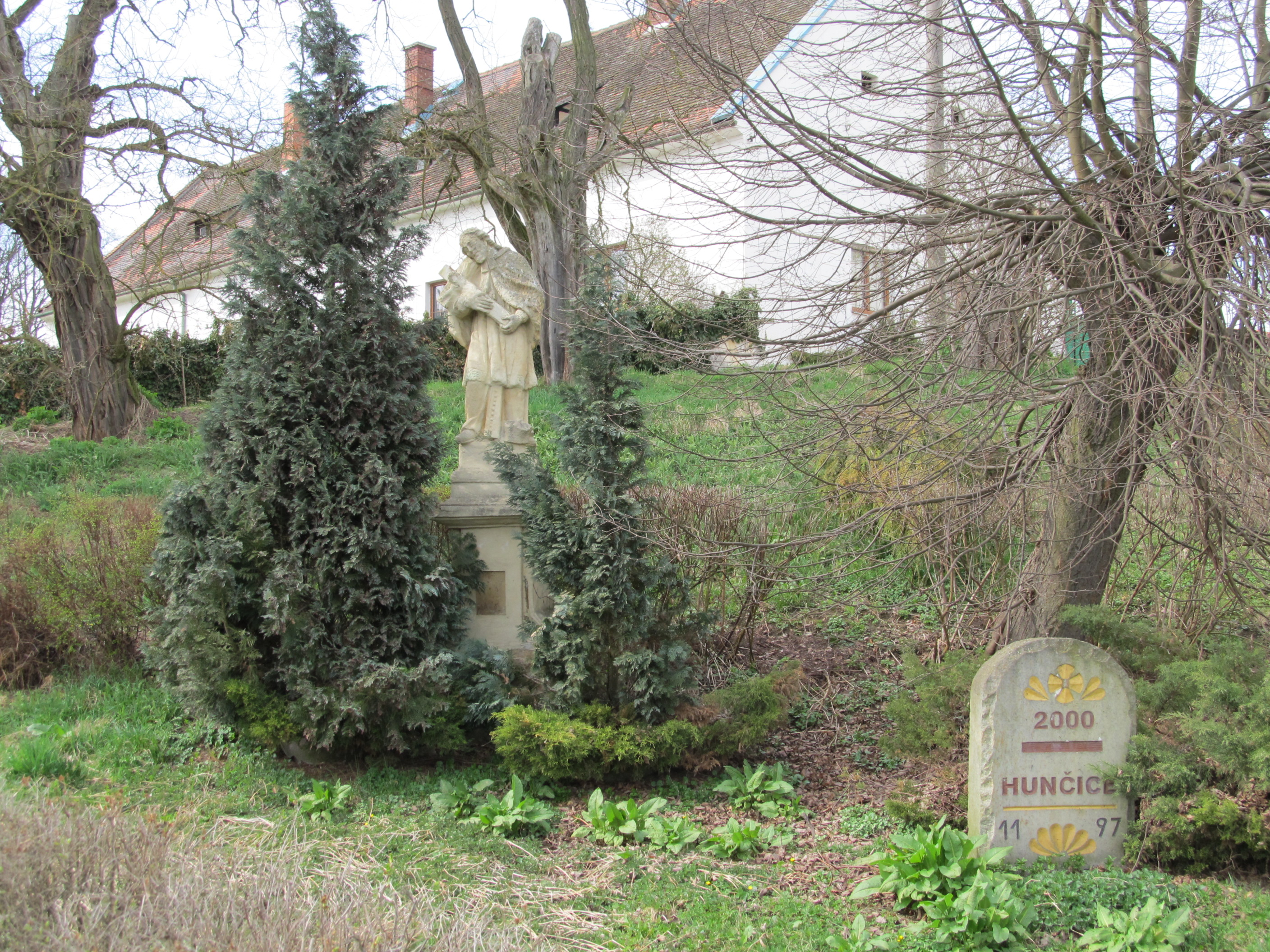 Hunčice - sv. Jan Nepomucký